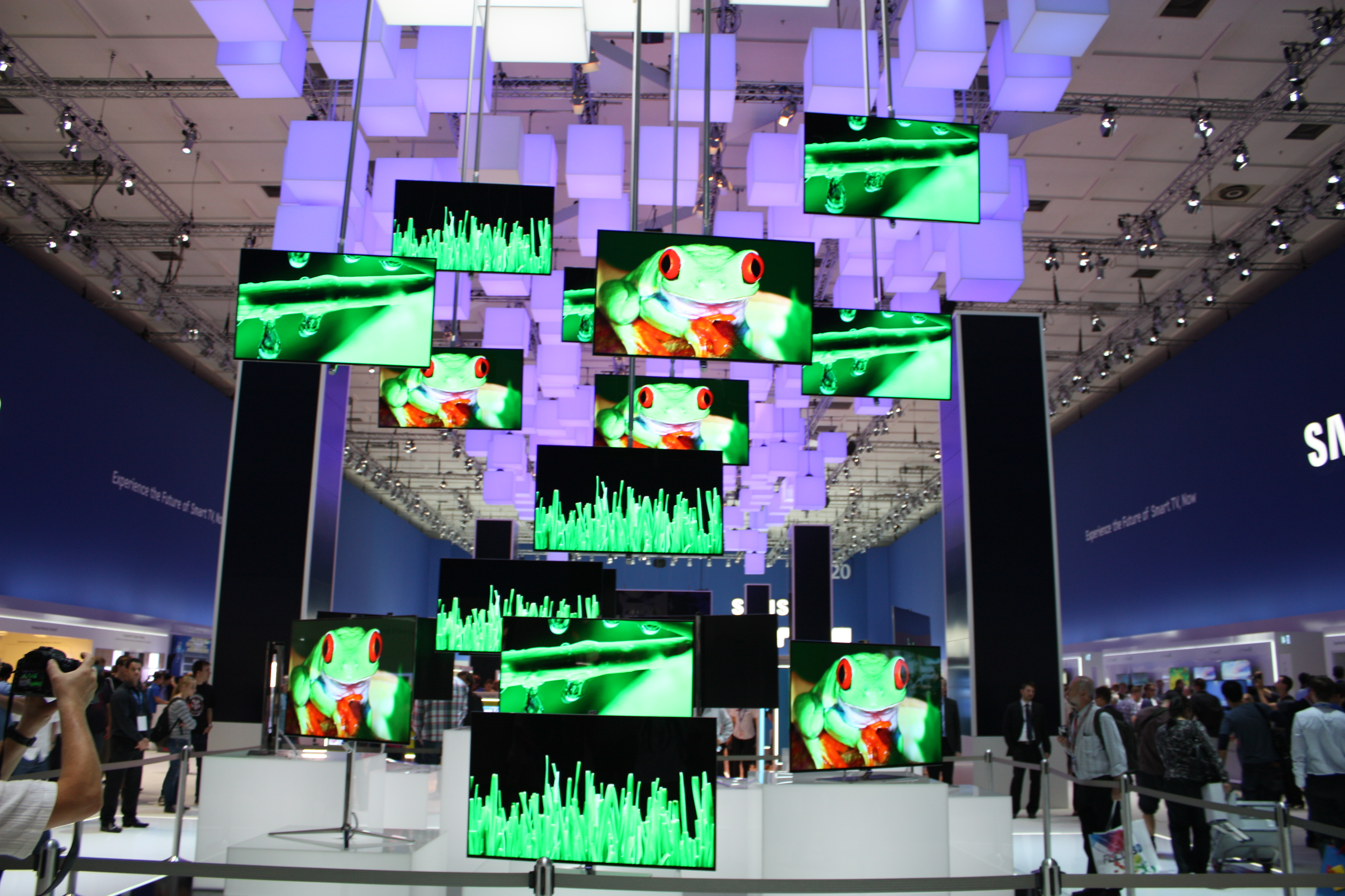 Internationale Funkausstellung 2012